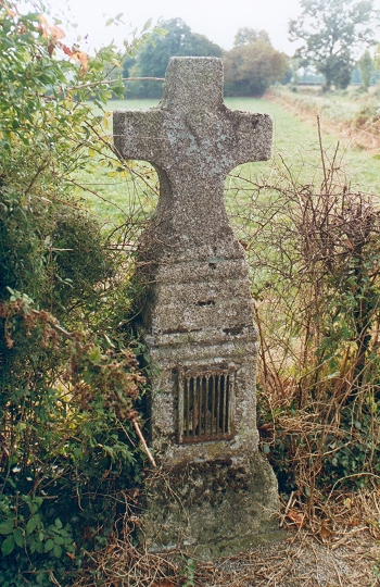 Croix du petit bouin